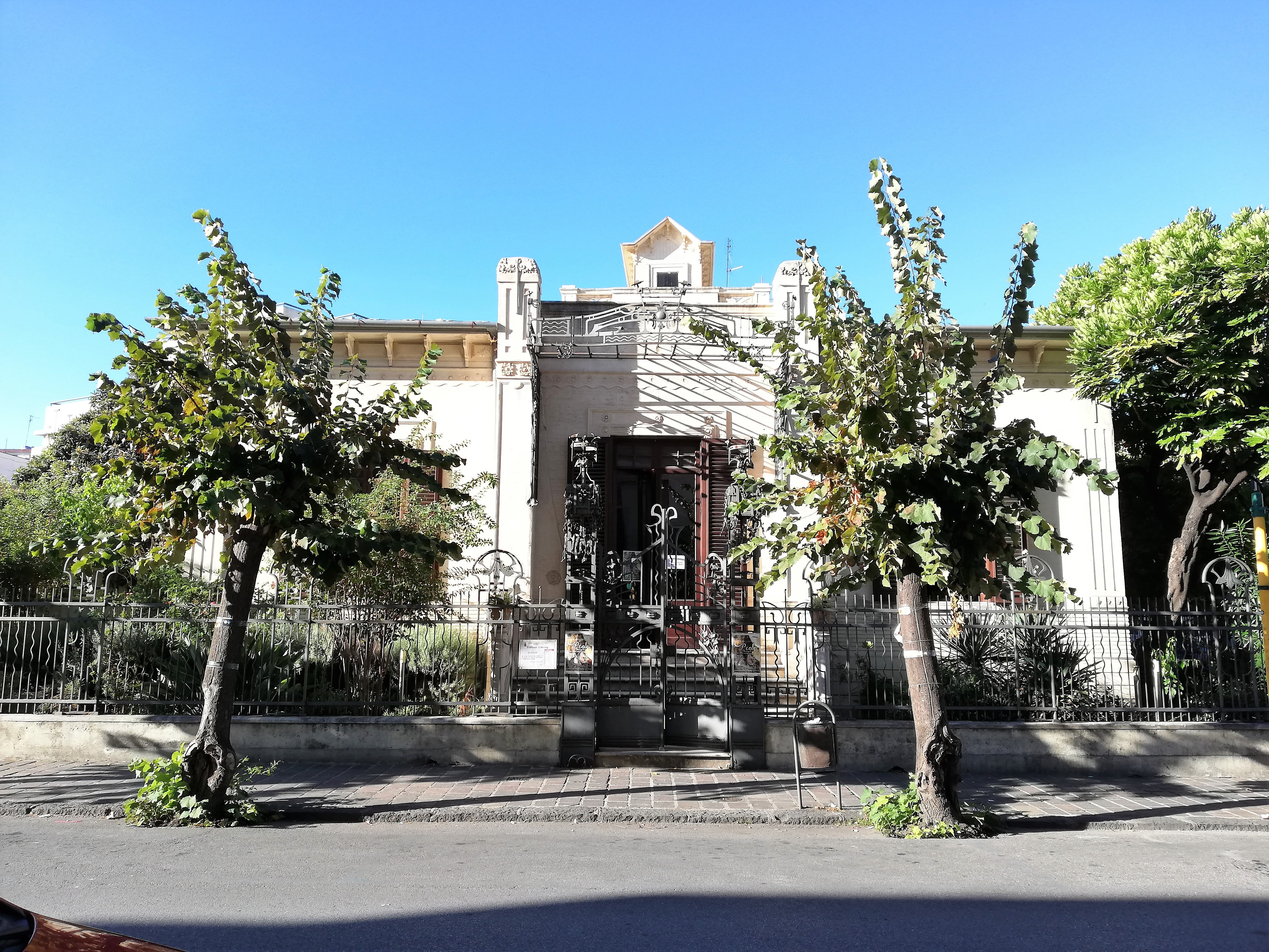 Prospetto di via Roma.